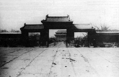 北京皇城东安里门